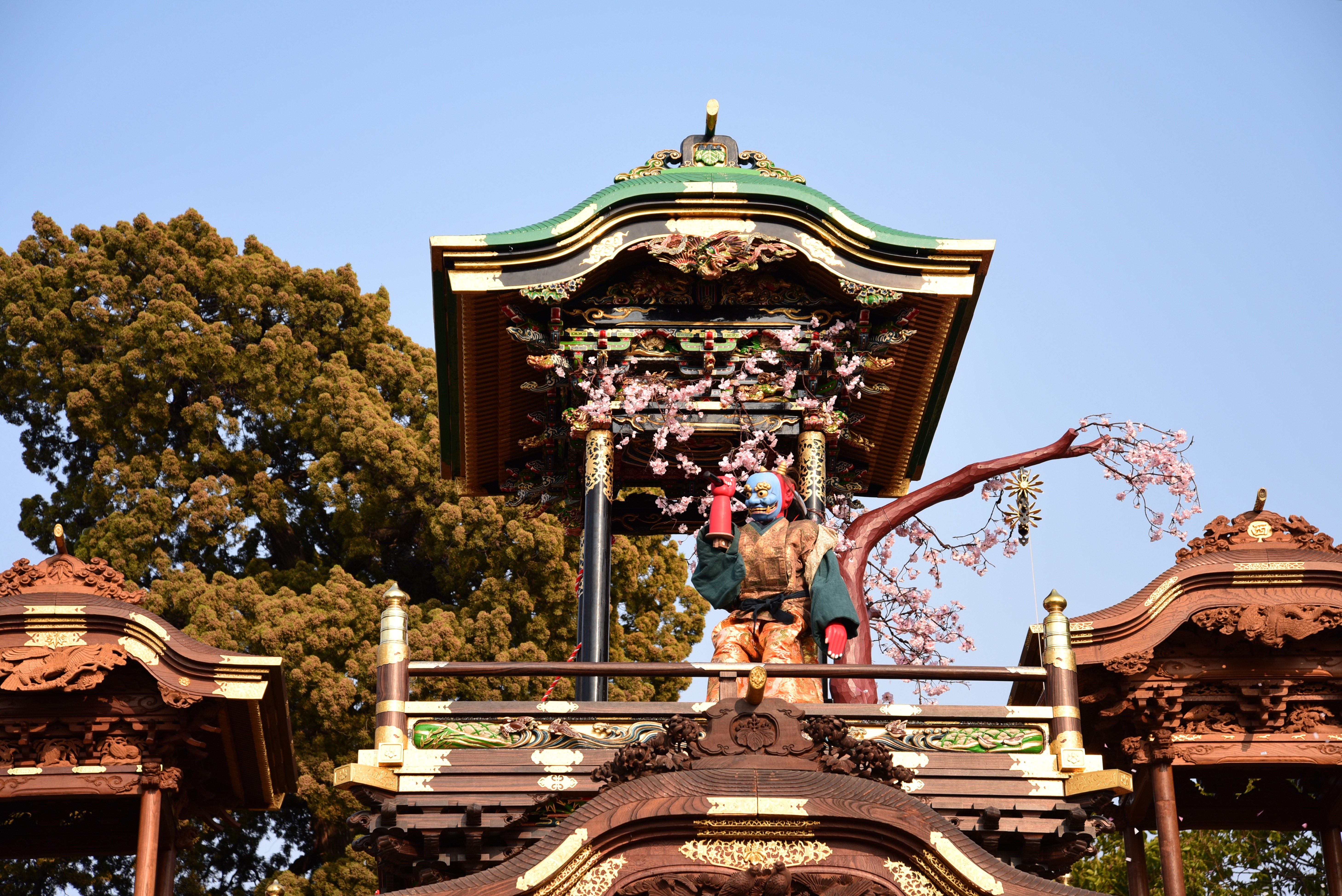 愛知県半田市の乙川祭禮。からくり人形（役小角大峯桜）